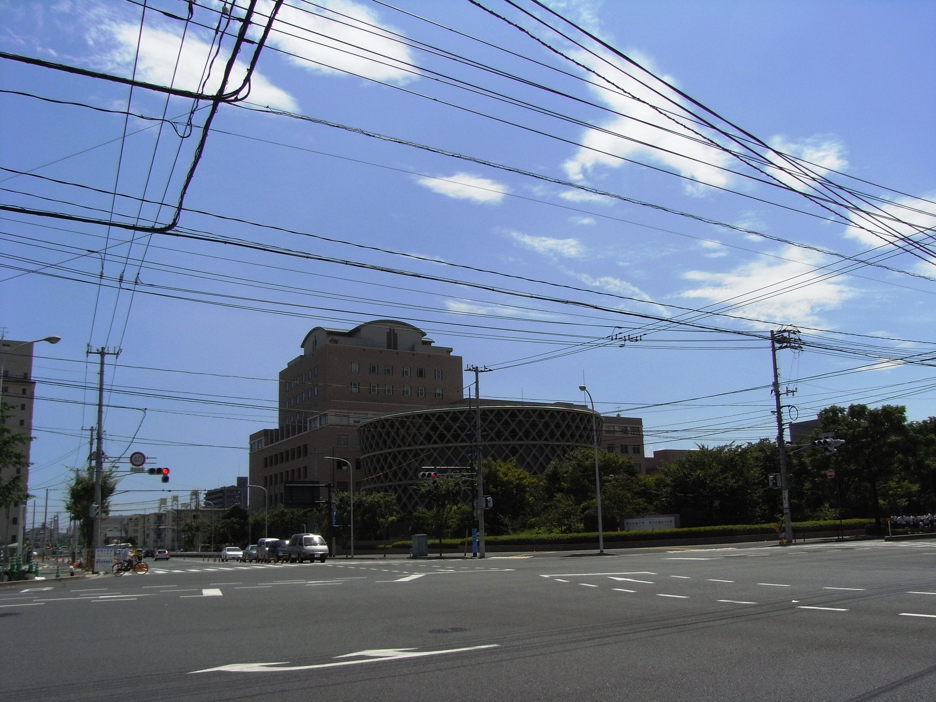 県立広島大学広島キャンパス(県立広島大学)